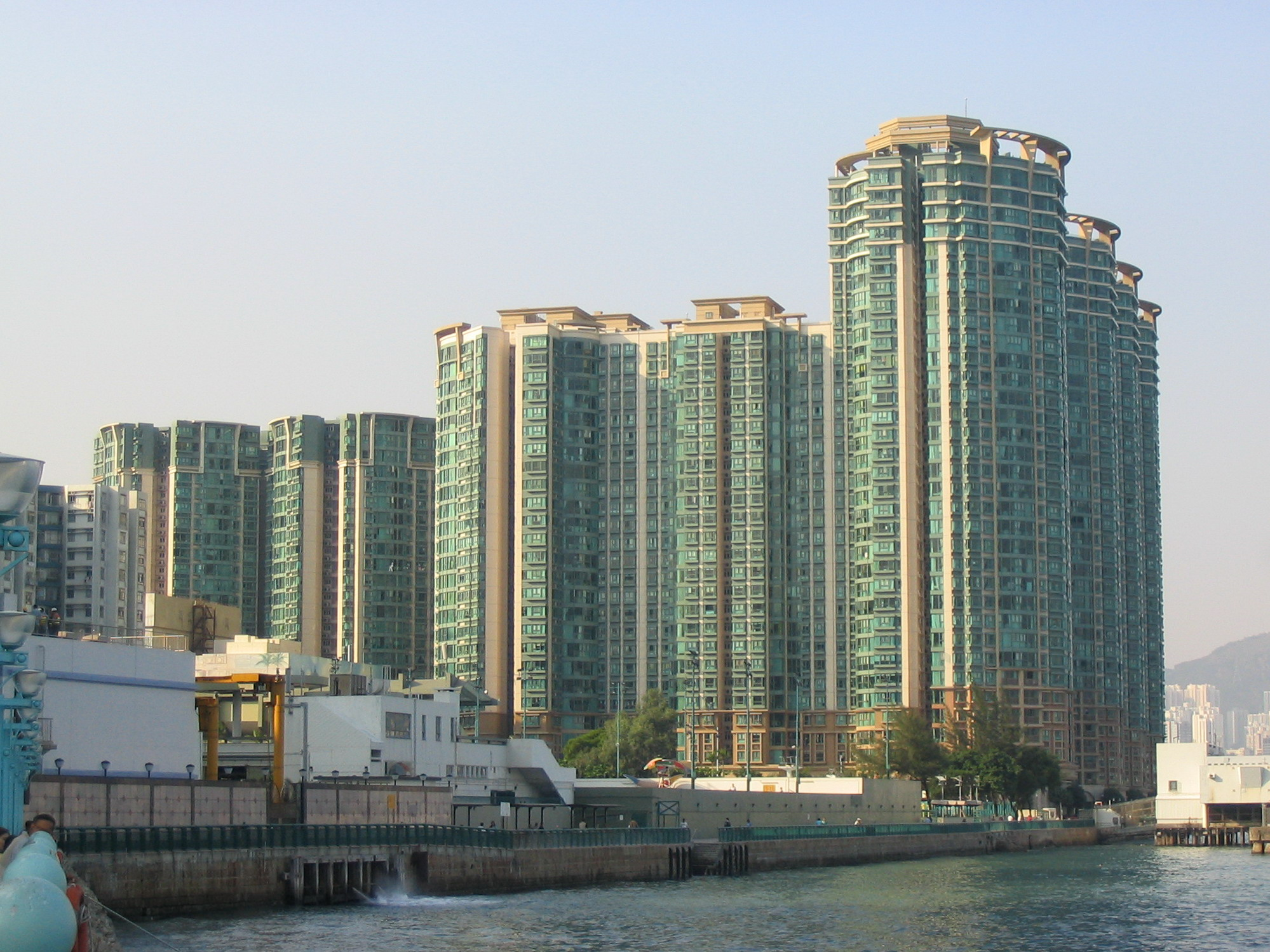 紅磡海逸豪園 Laguna Verde, Hung Hom